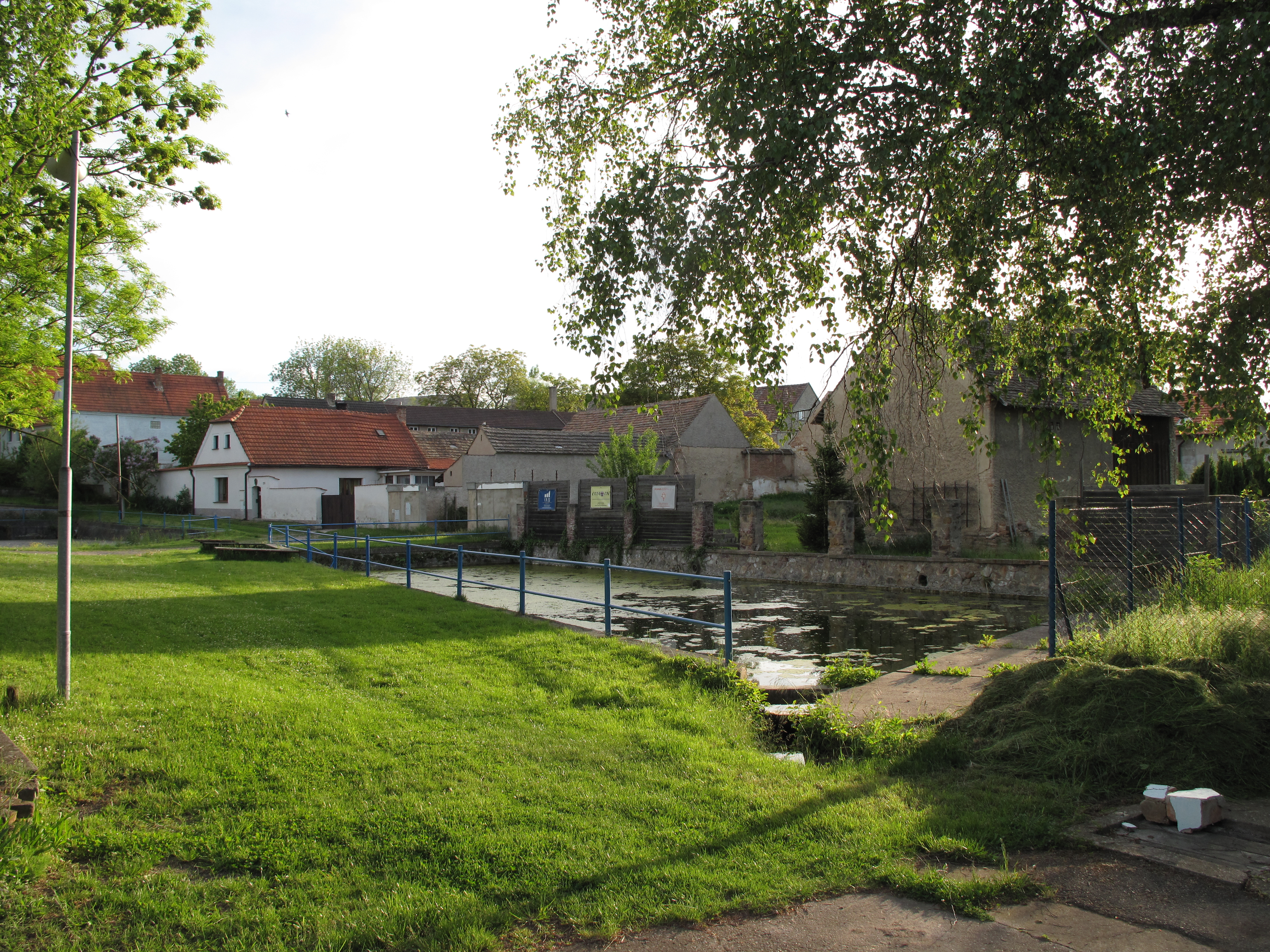 Rybník v Rochově. Okres Litoměřice, Česká republika.